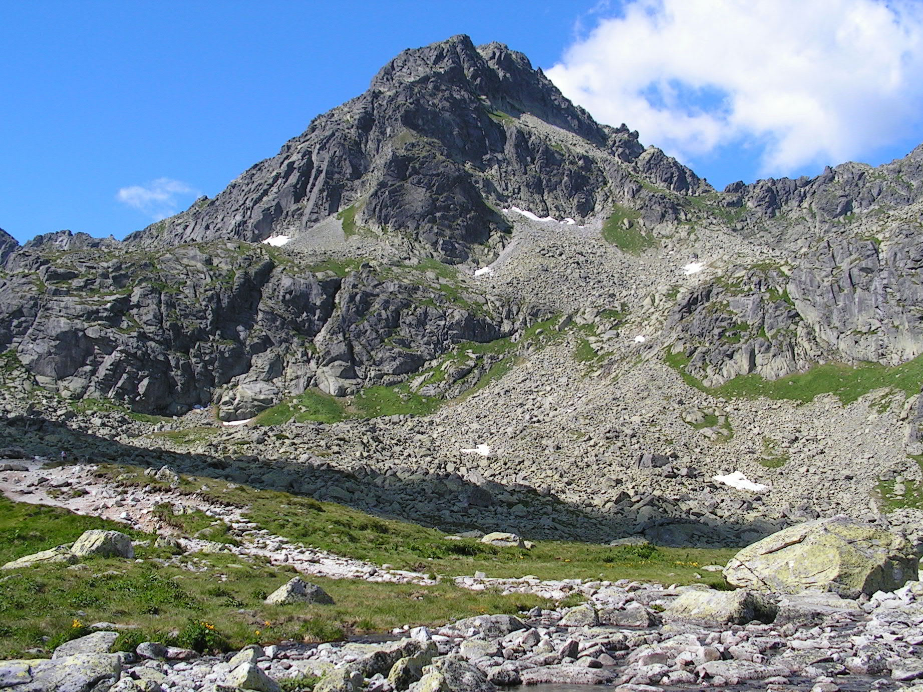 Szczyrbski Szczyt z Doliny Młynickiej.